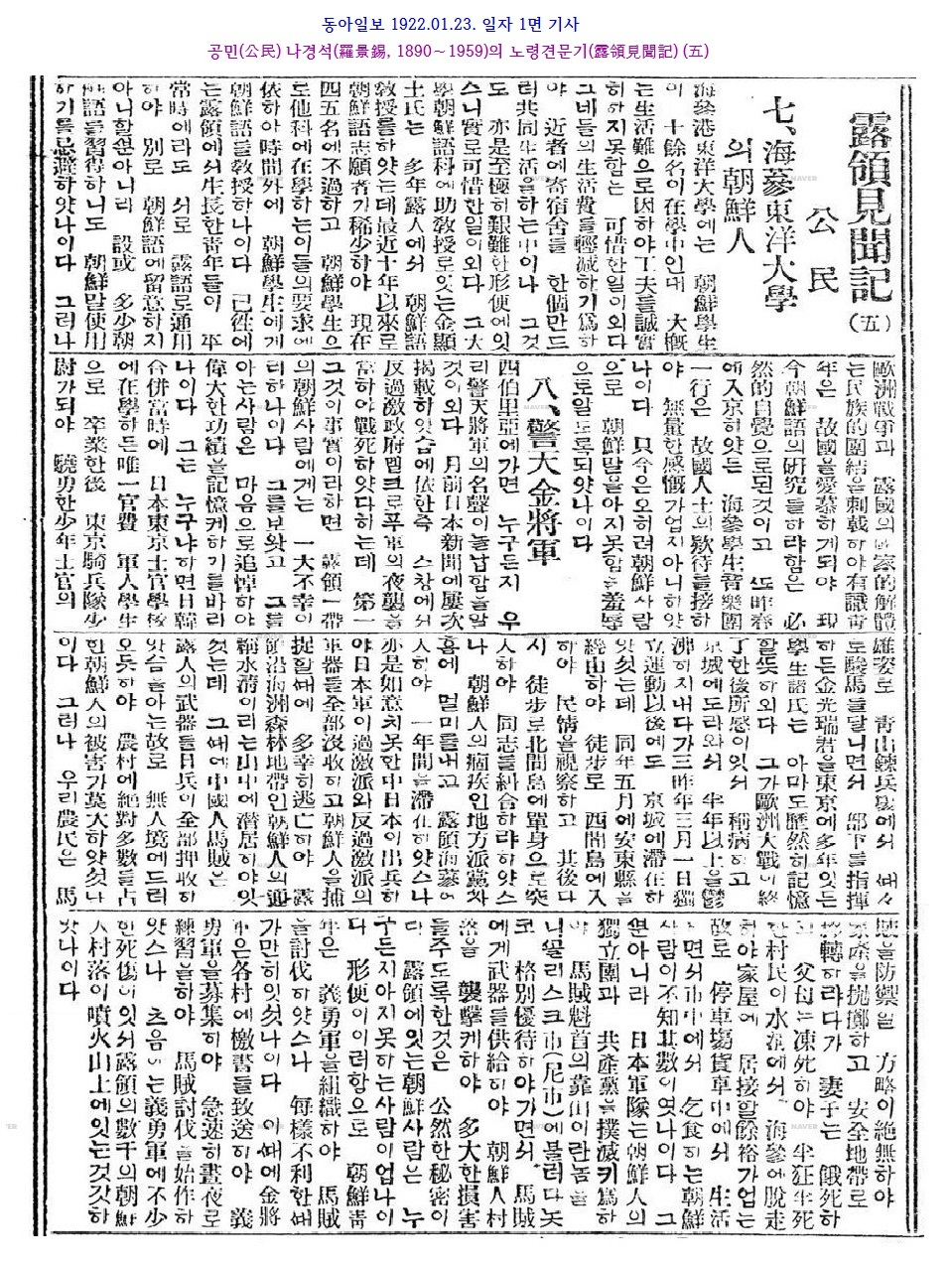 공민(公民) 나경석(羅景錫) "노령견문기(露領見聞記) 5"의 김경천 장군 기사 : 1922-01-23 동아일보 1면